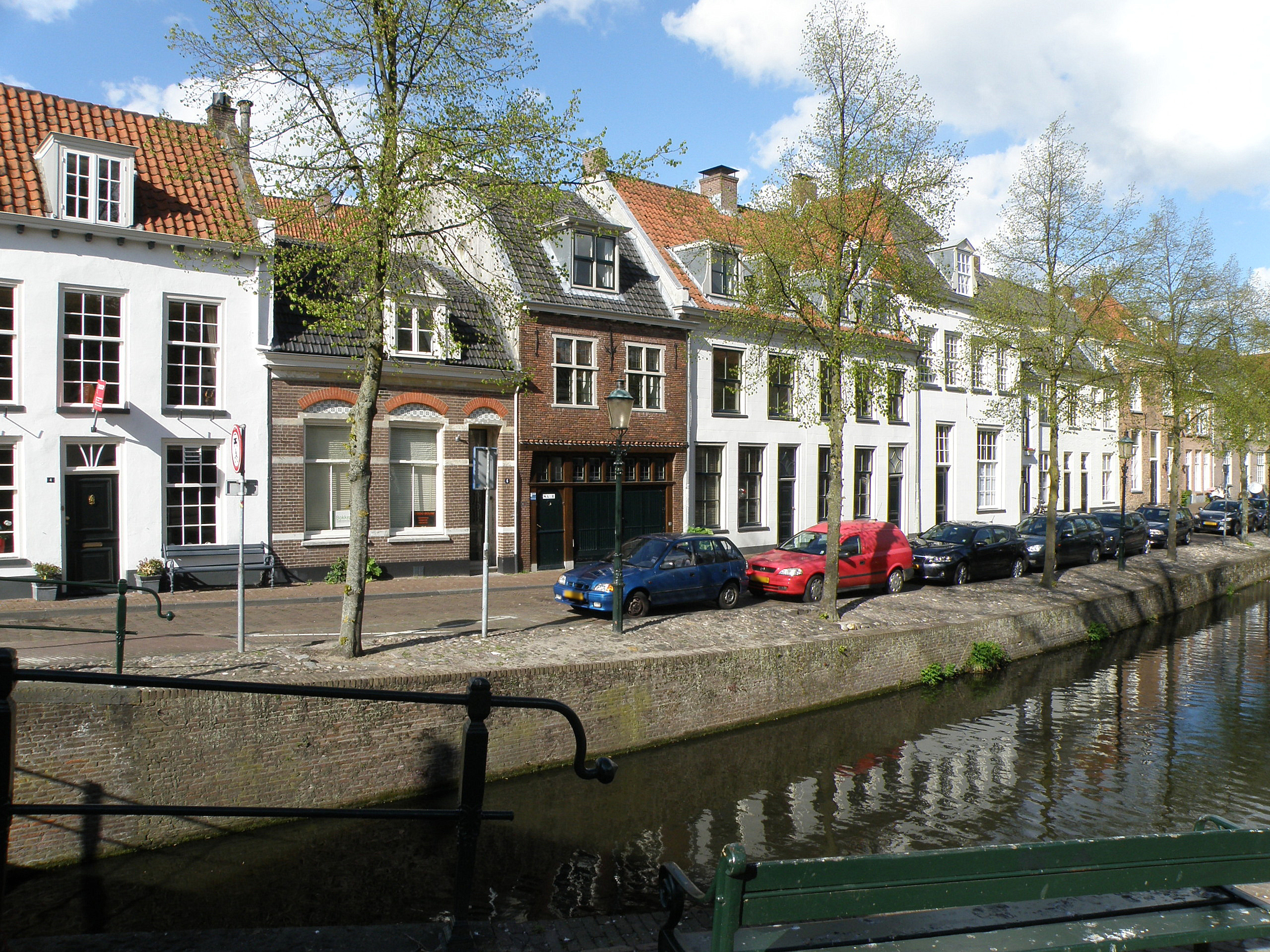 Amersfoort (prov. Utrecht, Nederland). Havik.